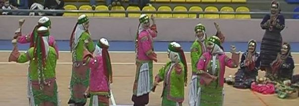 Balıkesir folkloru ile ilgili resmi kendim çektim.